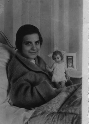 Conchita en su última enfermedad